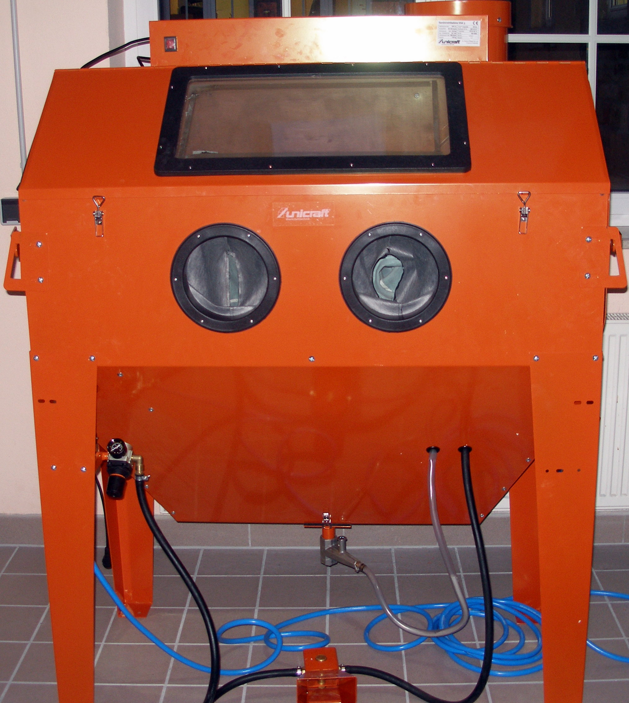 Sandstrahlkabine